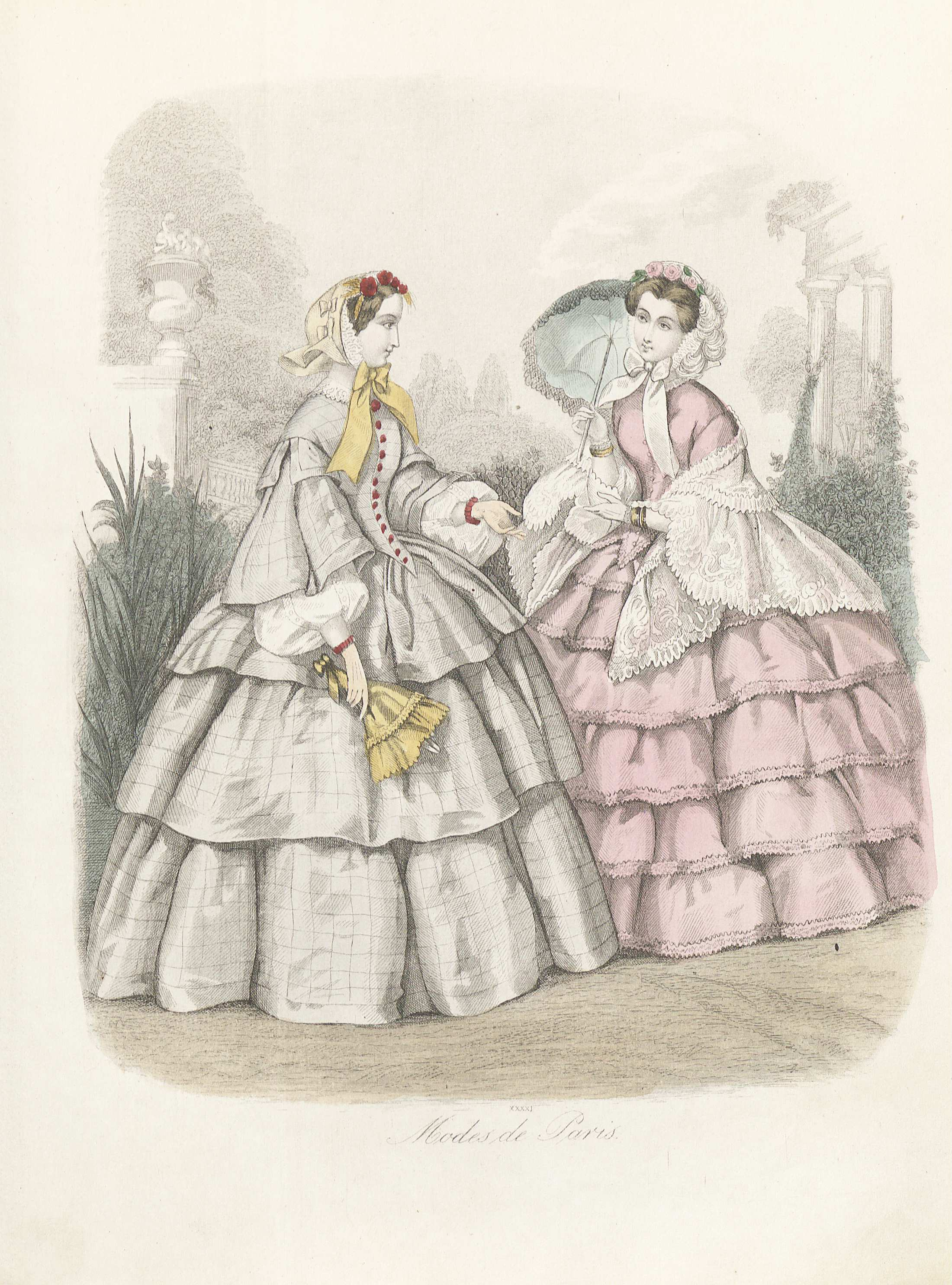 Klänning; Band; Spets; Blommor; Hatt; Diadem; Parasoll; Mantilj; Krage; Plymer